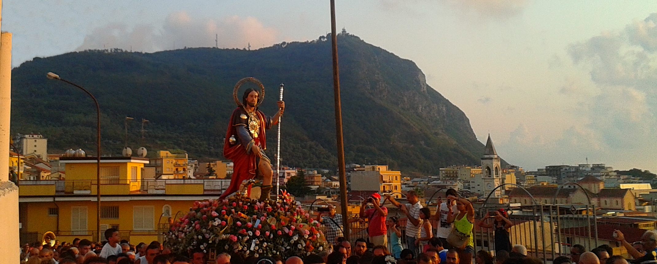 La processione di San Rocco a Palmi al passaggio davanti la chiesa del Rosario. Sullo sfondo Palmi ed il Monte Sant'Elia